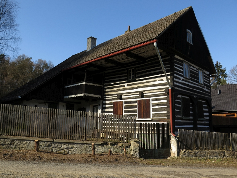 Usedlost čp. 14, Lhota 14, Lhota (Dubá).